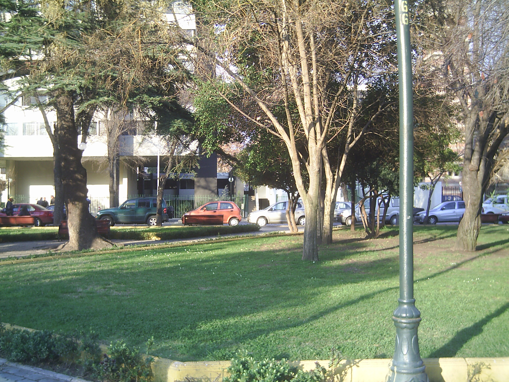 Plaza Ñuñoa